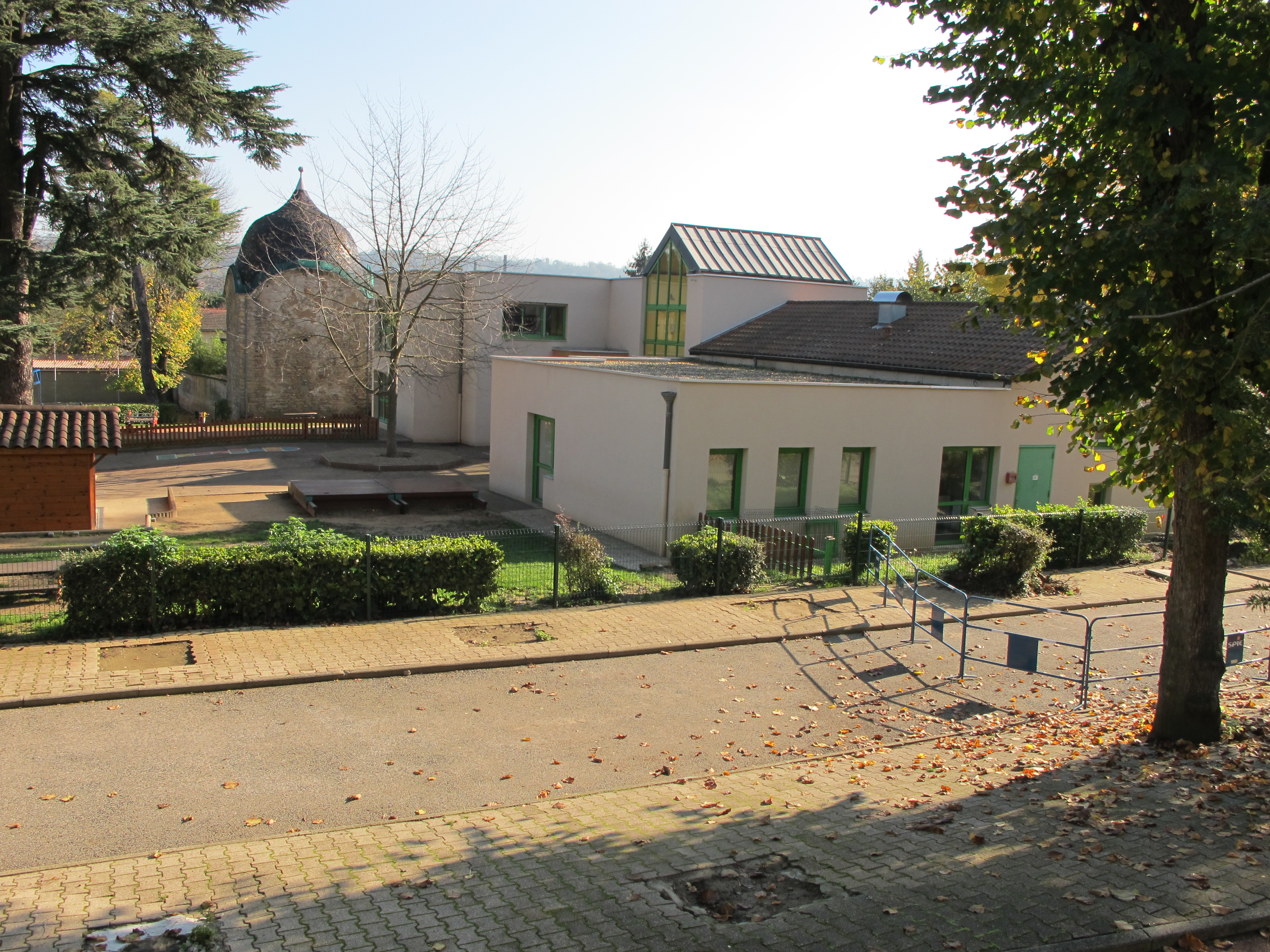 Ecole élémentaire du groupe scolaire des Frères VOISIN d'Albigny-sur-Saône, Albigny-sur-Saône, Rhône, France.